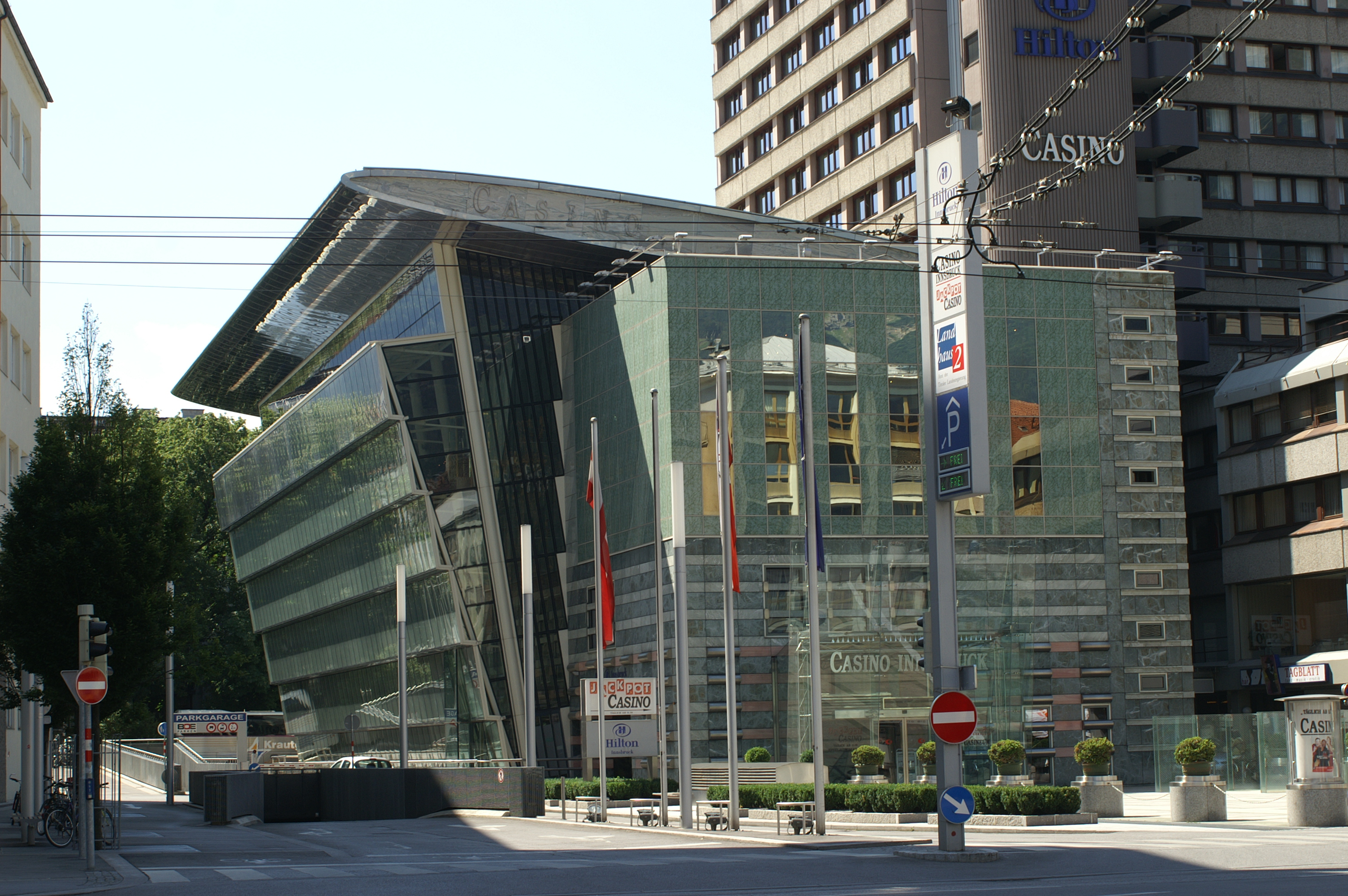 Innsbruck Stadt, Casinos Austria